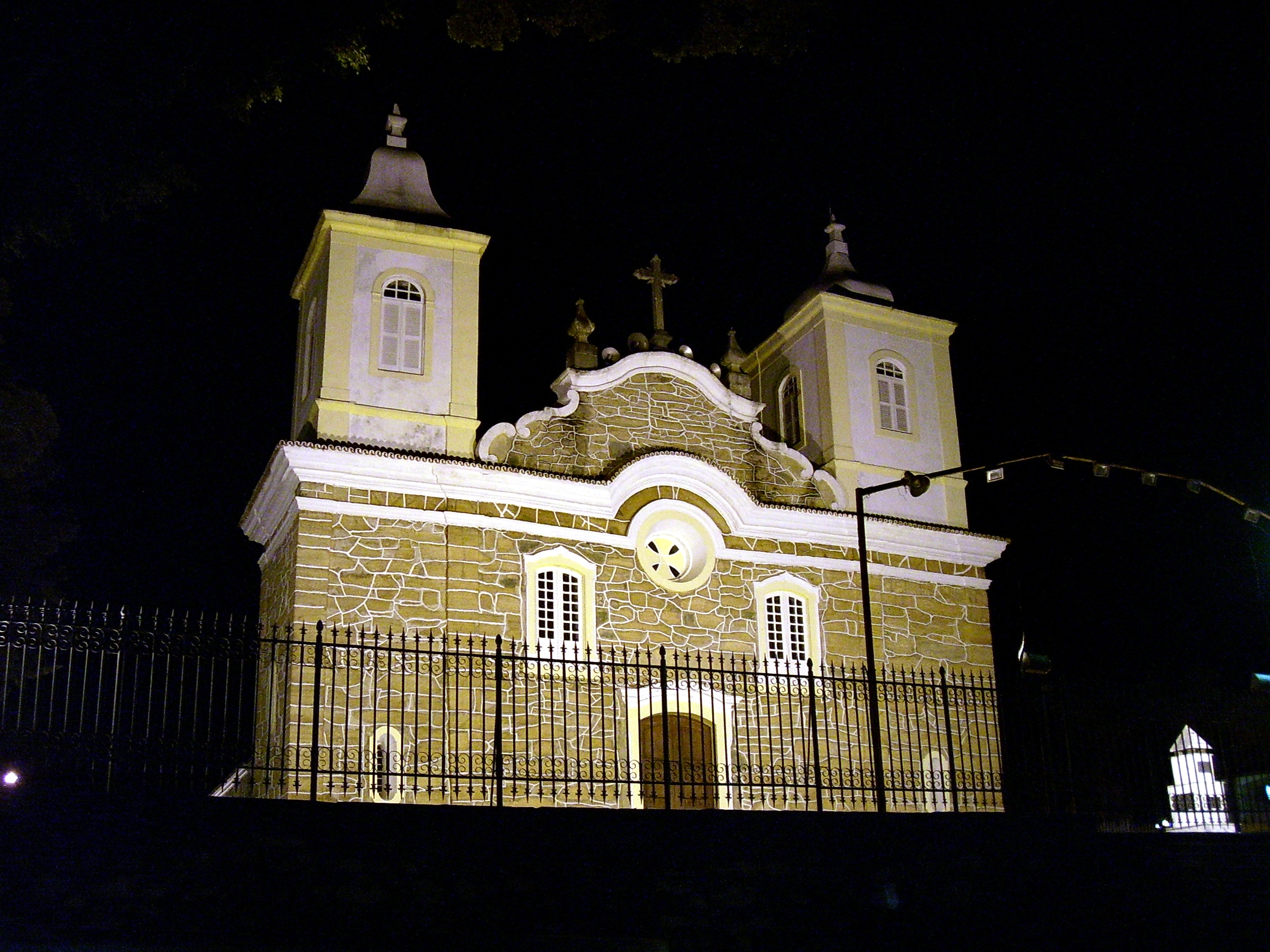 Foto noturna da Igreja Matriz de Carrancas.